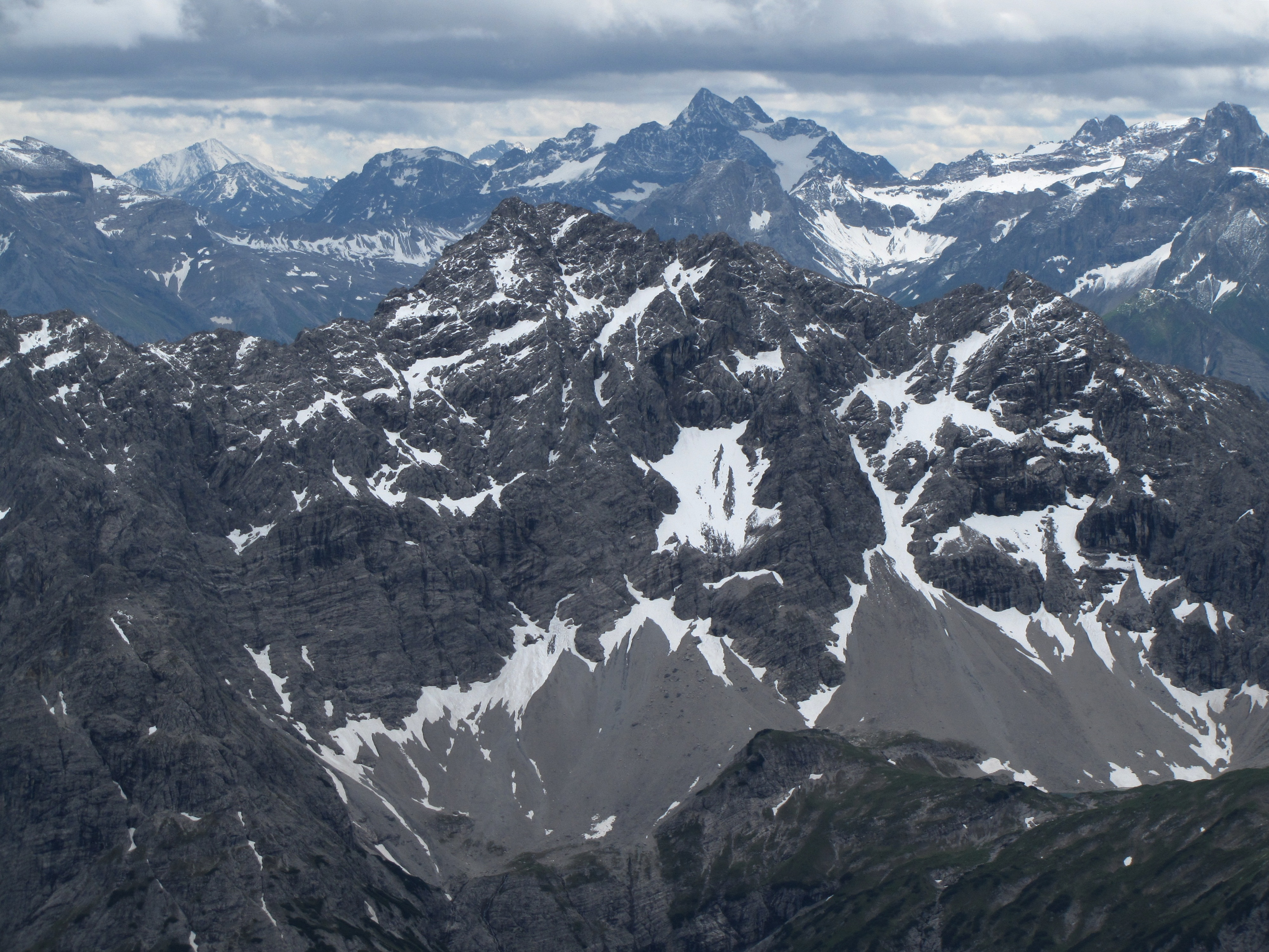 Blick vom Gipfel des Hochvogel (2592 m) nach Norden zur Kreuzkarspitze (2587 m).